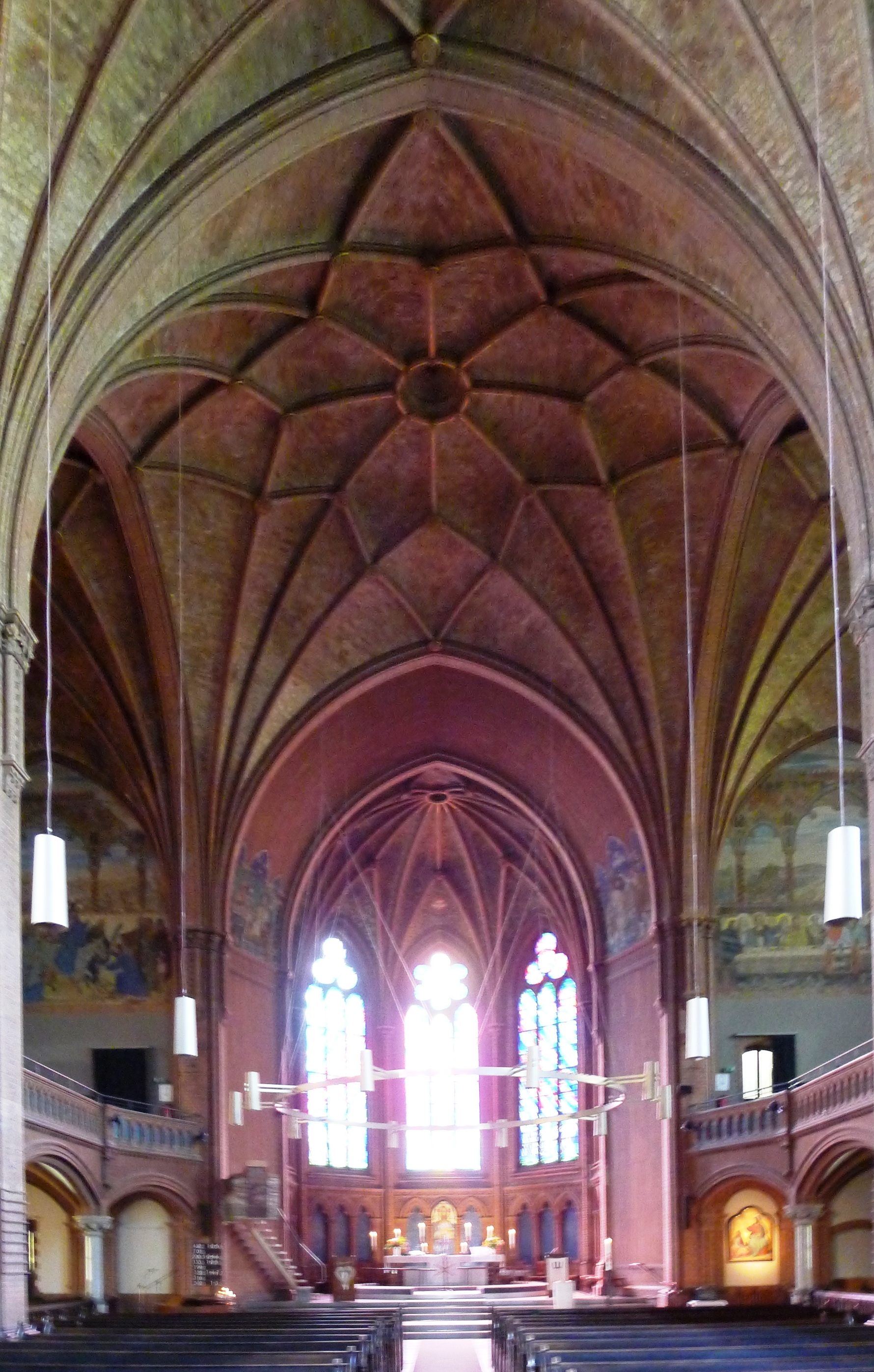 Blick vom Eingang zur Apsis